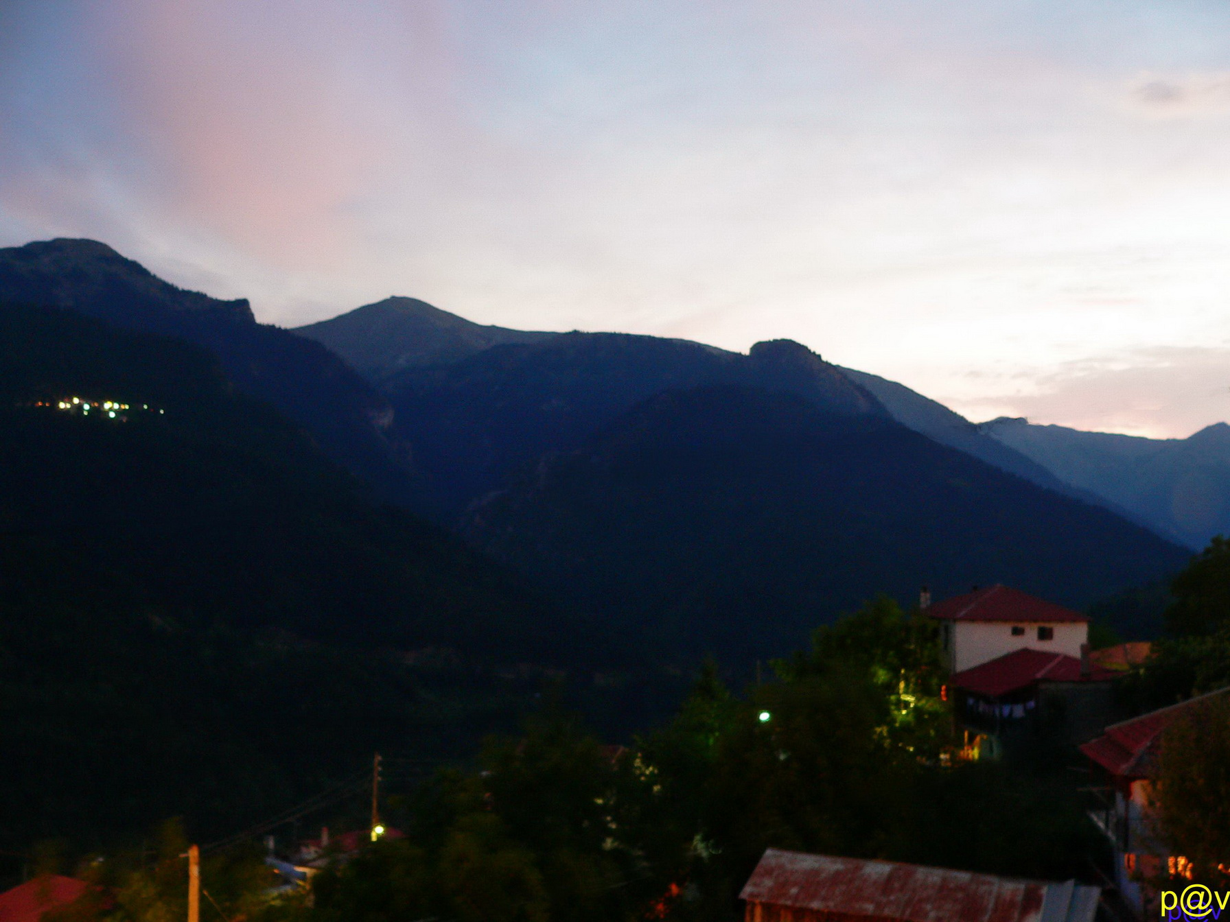 Η Ωραια κοιμωμενη